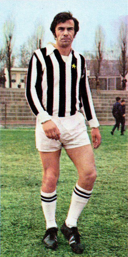 Il calciatore italiano Gianluigi Savoldi alla Juventus all'inizio della stagione 1970-71.